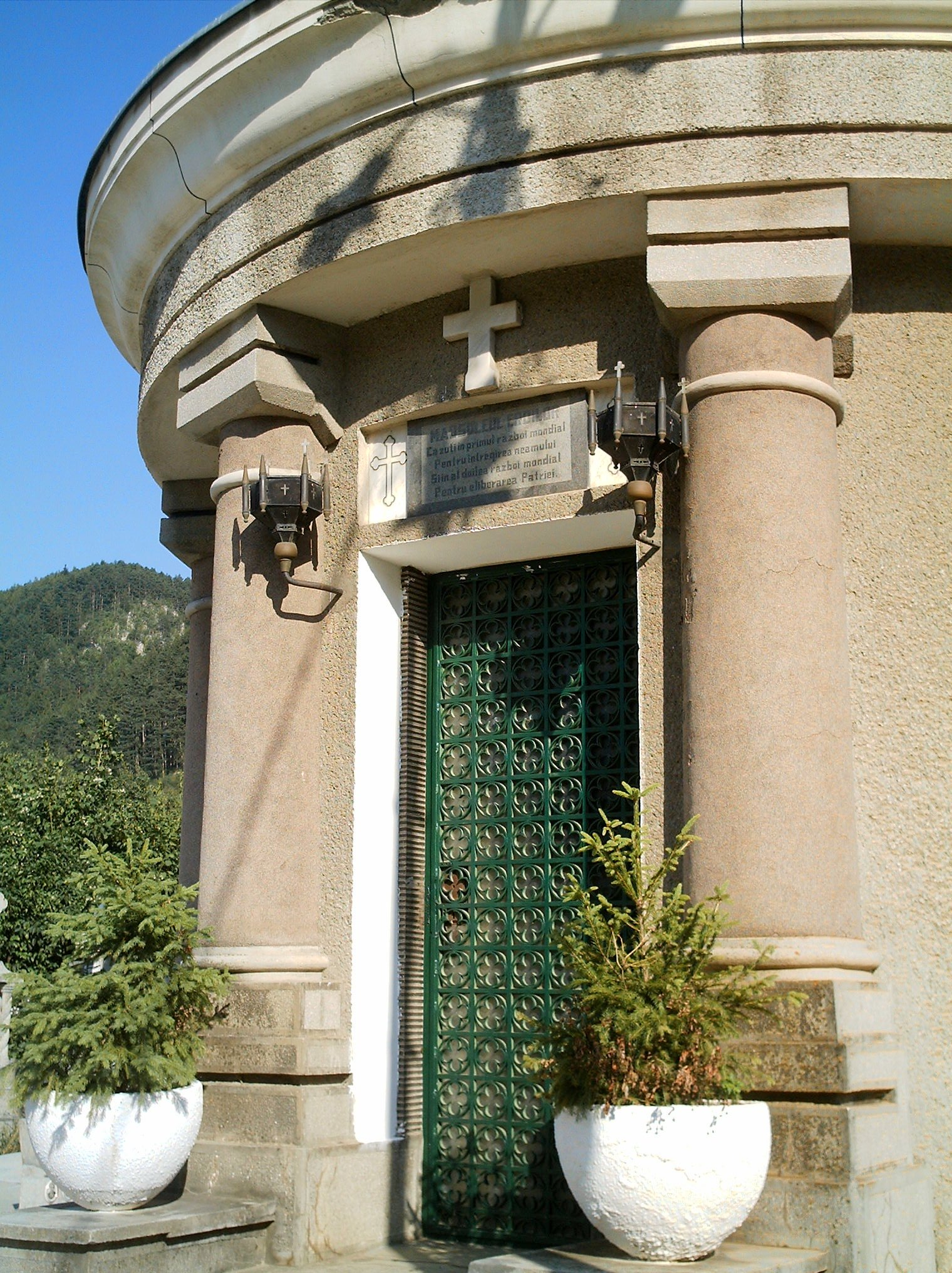 Heroes' Mausoleum (WWI and WWII) 04